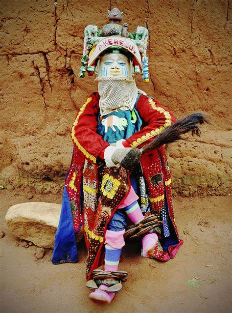 La première image est une culture béninoise d'origine "SAKETE" appelé guèlèdè. Elle représente le Bénin a la une dans le domaine national comme international.